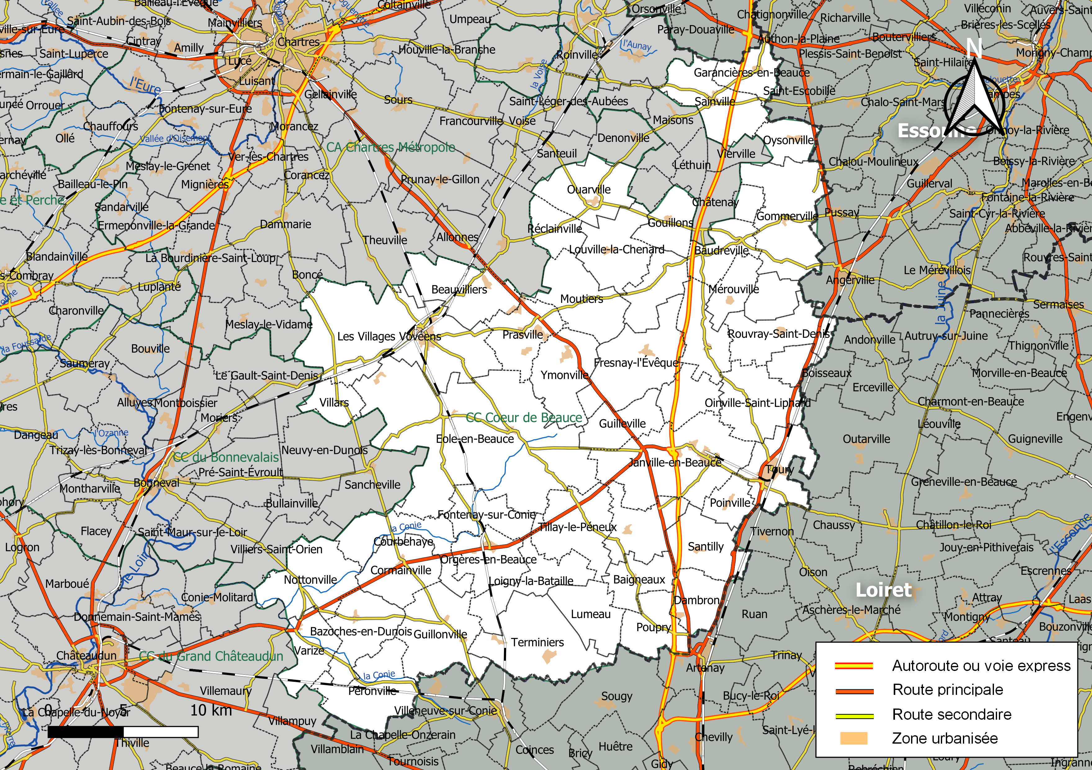 Carte géographique de la communauté de communes Cœur de Beauce, département d'Eure-et-Loir, France. Composition au 1er janvier 2019.